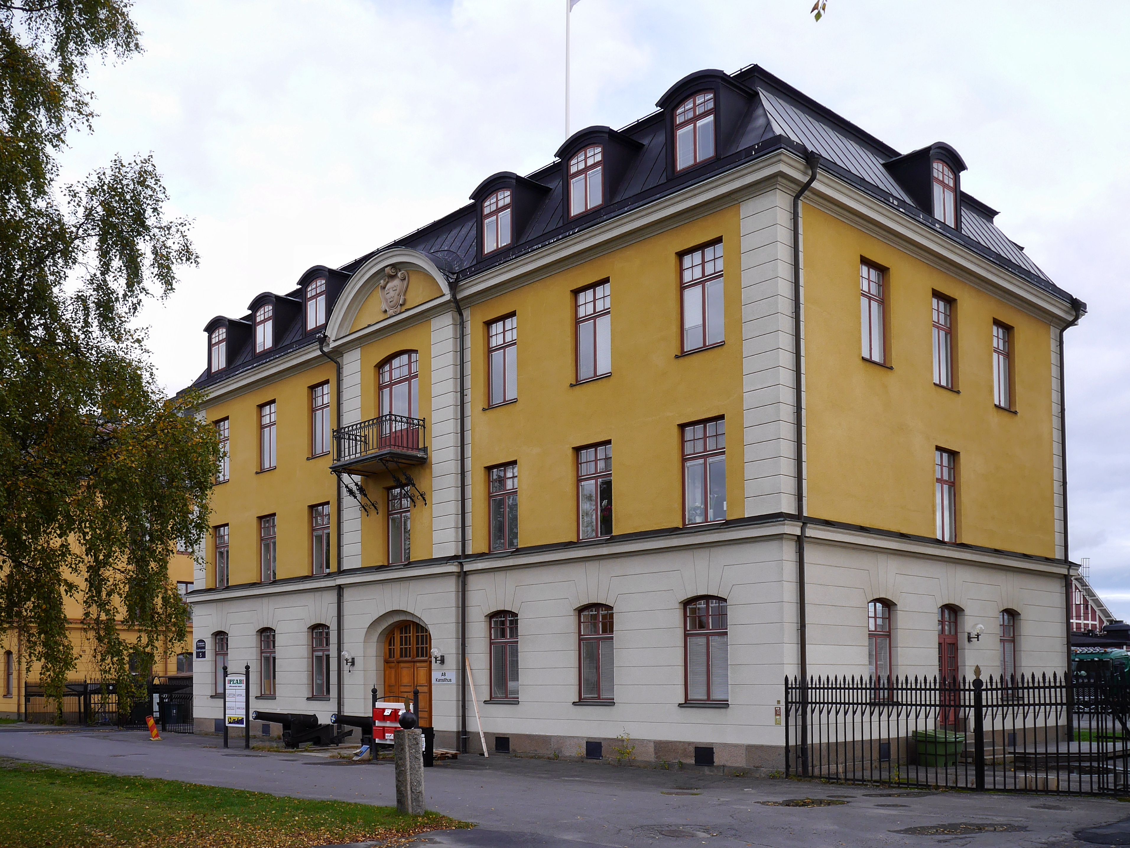 Bodens artilleriregemente (Boden 1:129 och 57:36). Bodens artilleriregemente (A 8) är ett av flera regementsområden som ingick i Bodens strategiska försvar och Bodens garnison.